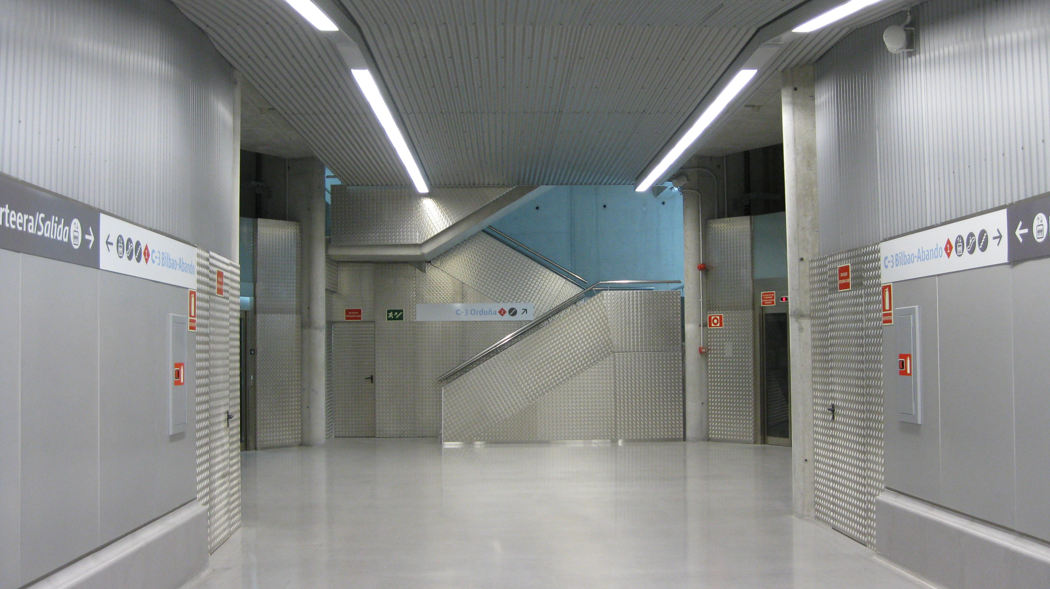 Miribillako Renfe geltokiko nasetara sarbideak / Accesos a los andenes de la estación de Renfe de Miribilla